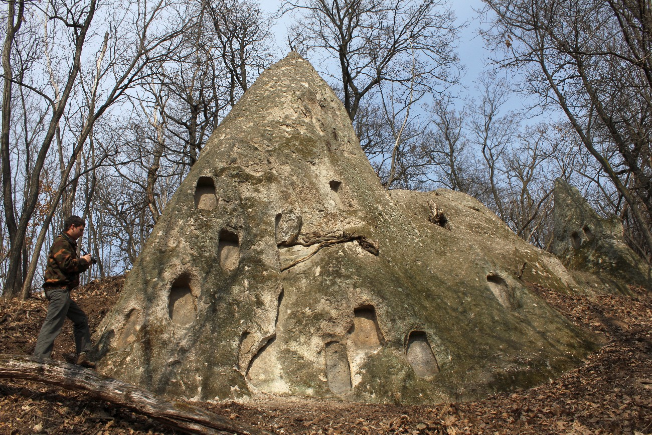 B4h, Cserépváralja, Csordás-völgy, 1. kúp